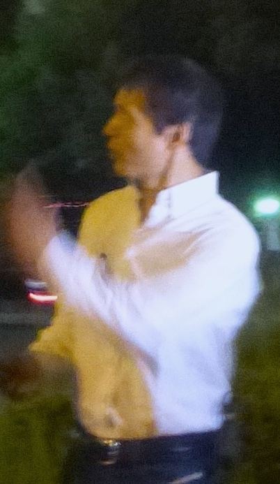 阿部 祐二（あべ ゆうじ [Yūji Abe]、1958年8月14日 - ）は、日本のテレビリポーター、俳優。